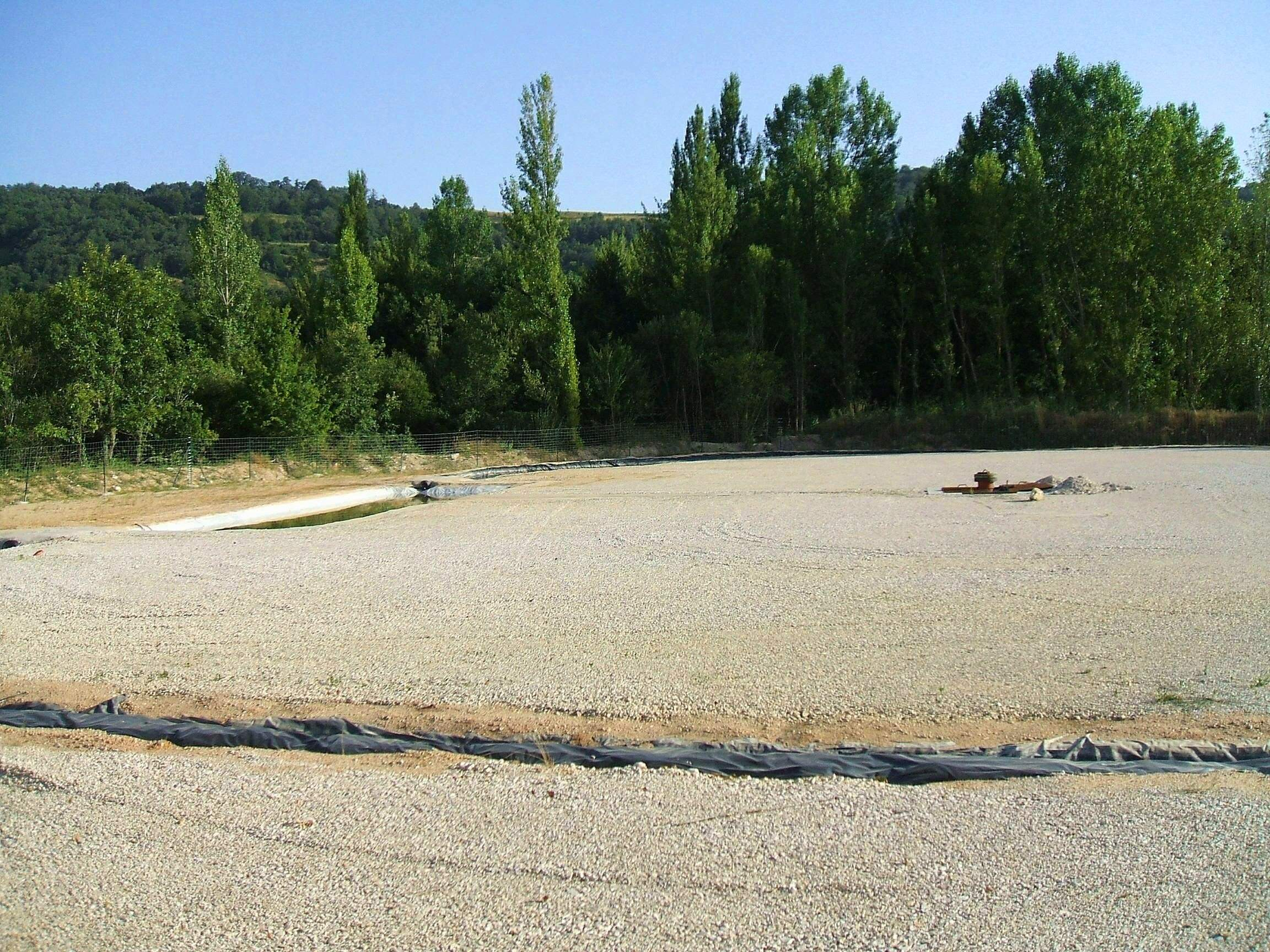 El antiguo pozo de petróleo "Tozo 1", en Prádanos del Tozo (Burgos). Agosto de 2007